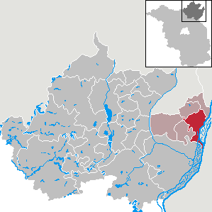 Gartz (Oder) in Brandenburg (Country) - District Uckermark